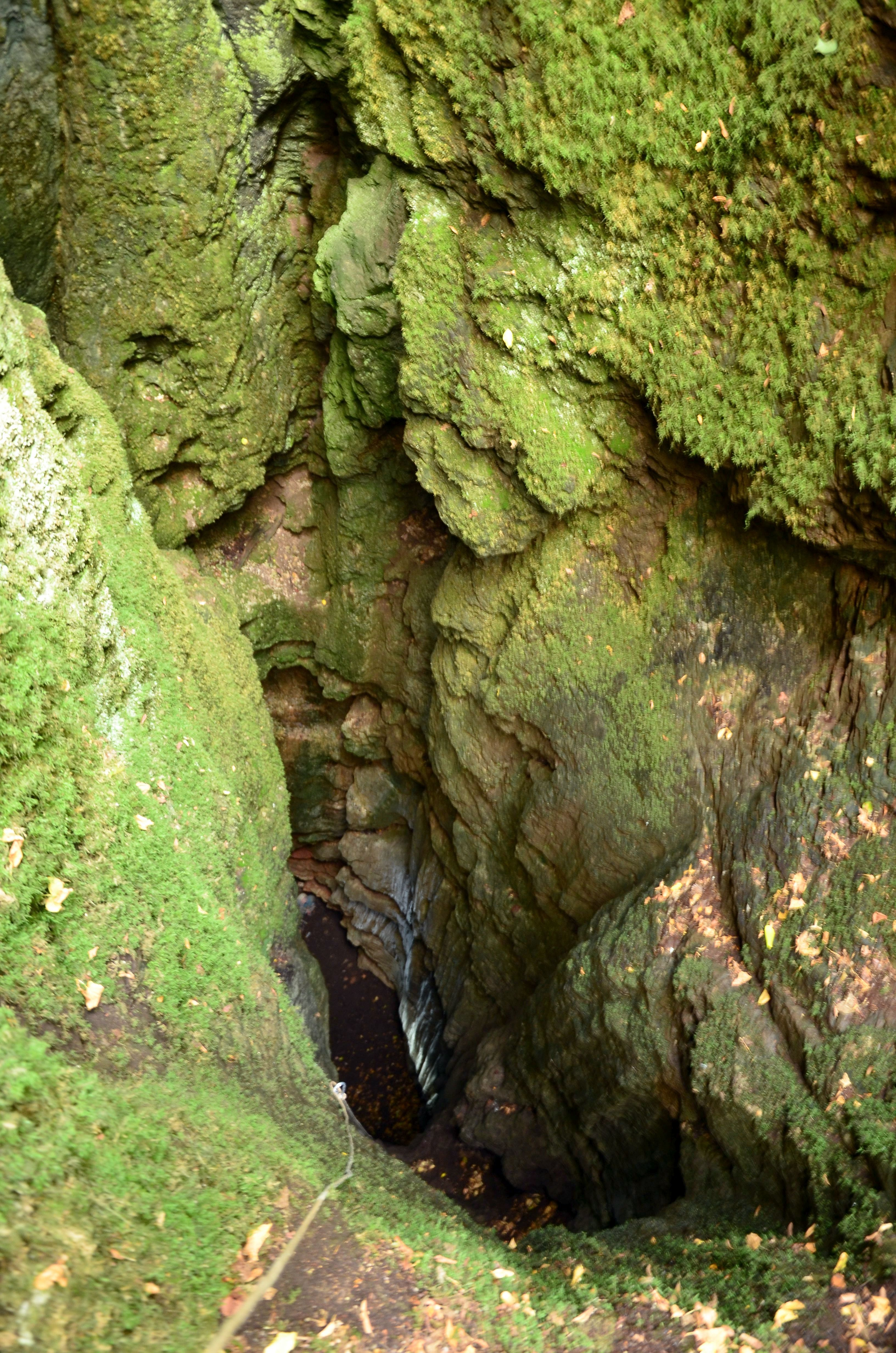 Takmer 60 m hlboká vadózna šachta senilnej Drienkovskej priepasti známej už od r. 1912. Na Dolnom vrchu je vysoká hustota zvislých jaskýň - priepastí. Preto synonymom Dolného vrchu je označenie "Krajina priepastí".